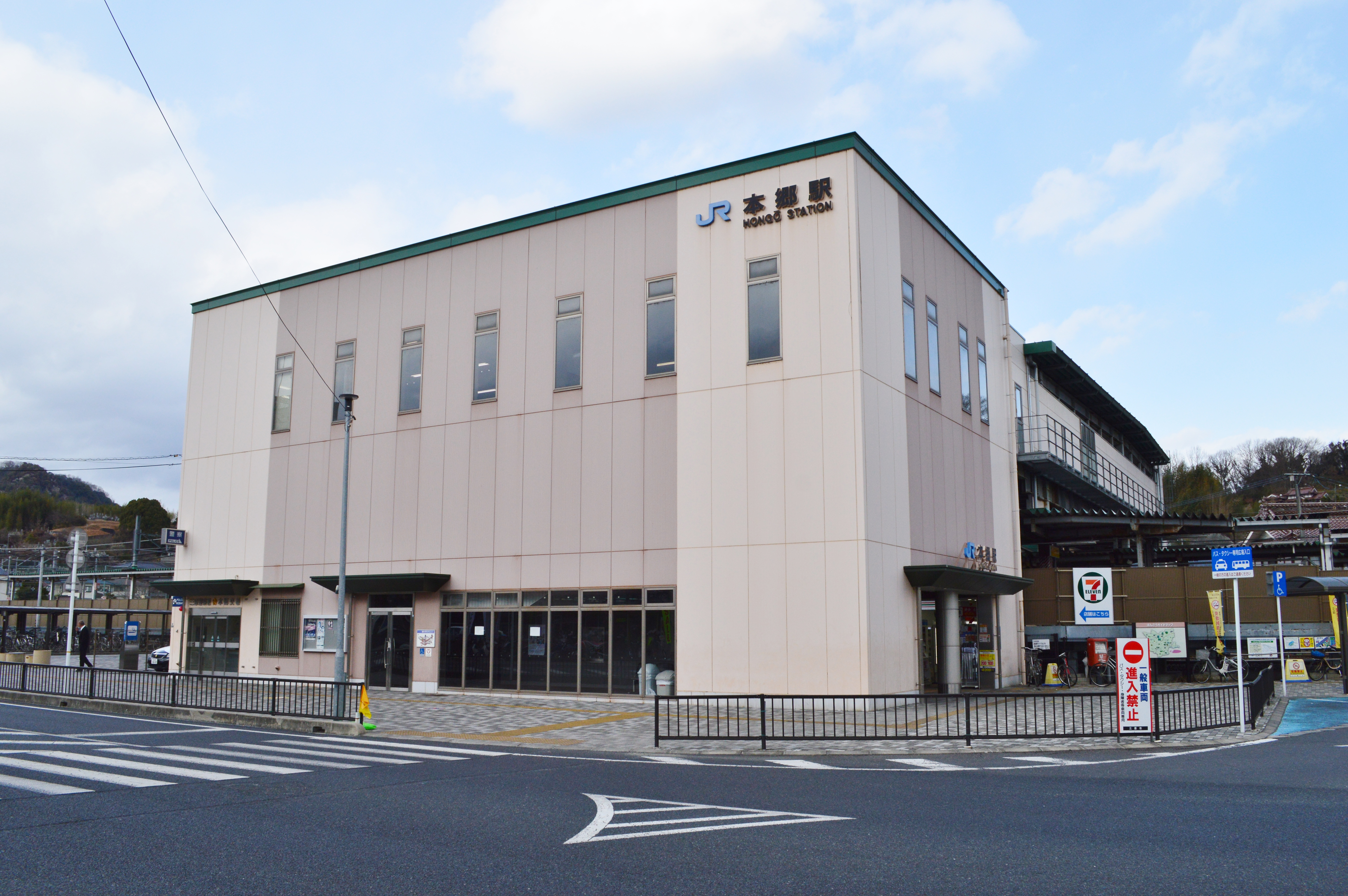 本郷駅 (広島県) 駅舎